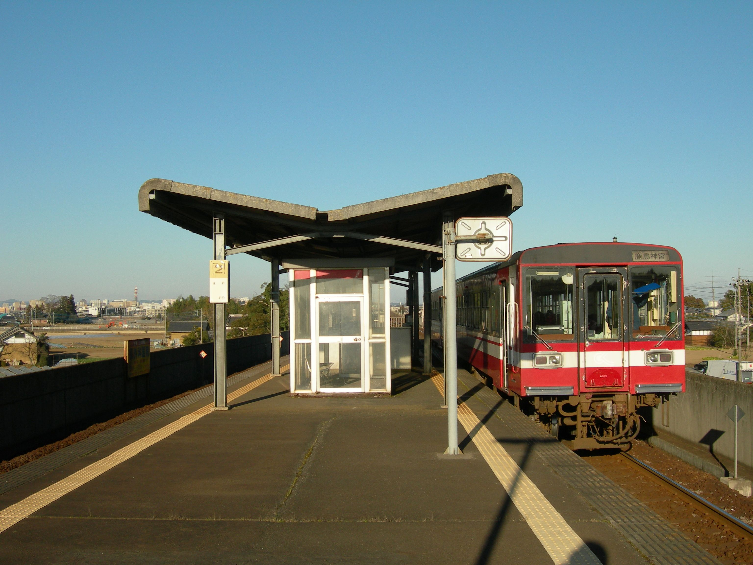 東水戸駅ホーム